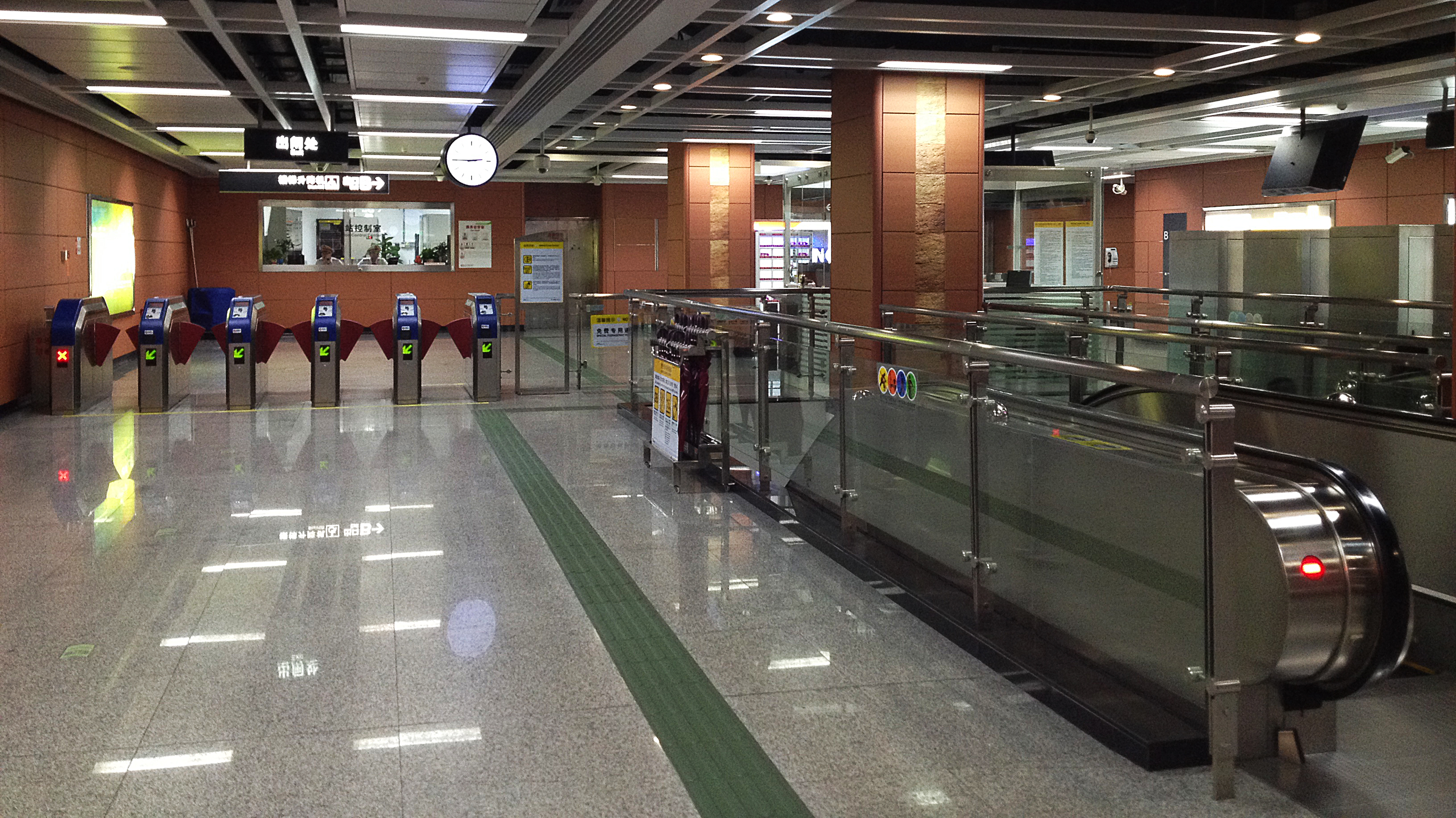 广佛地铁同济路站站厅